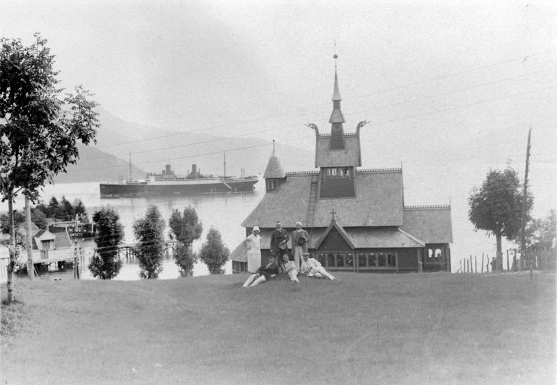 Polarfahrt mit dem Dampfer "München".- Die Kirche von Bergen, im Hintergrund der Dampfer "München" 17. Juli - 12. August 1925